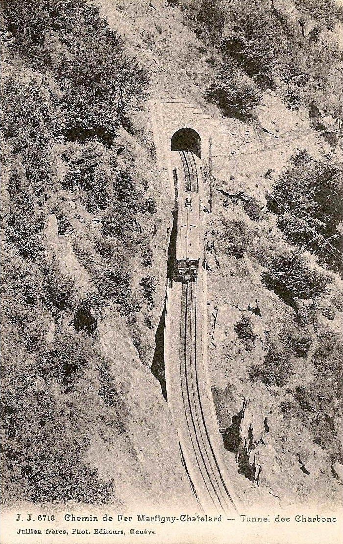 Chemin de fer de Martigny-Châtelard - Tunnel des Charbons, Valais, Suisse.